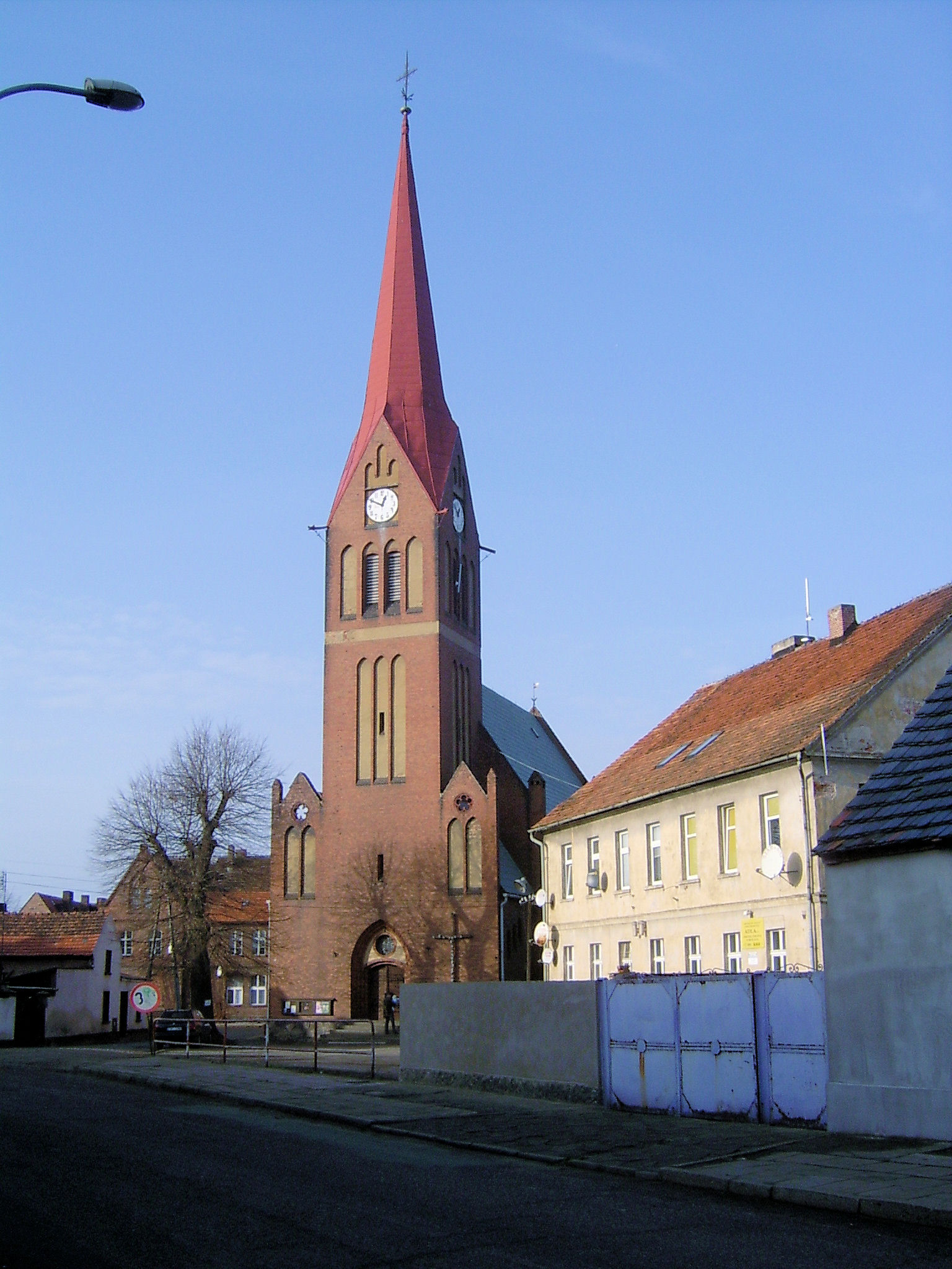 Brójce (gm. Trzciel, woj. lubuskie, Poland)